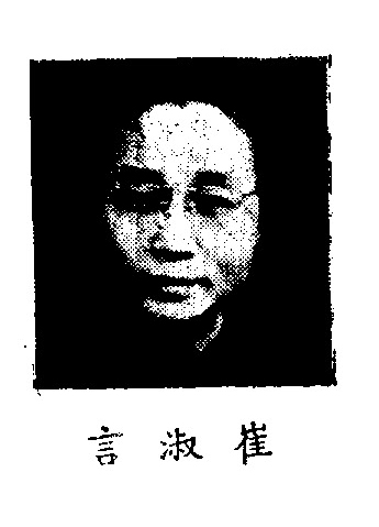 中文（中国大陆）: 制憲國民大會代表